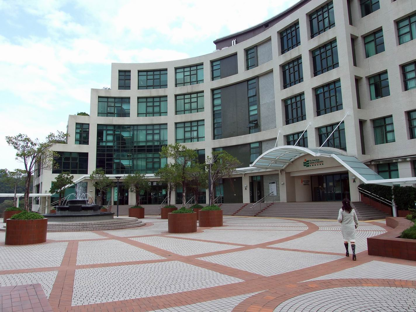 香港教育學院行政大樓